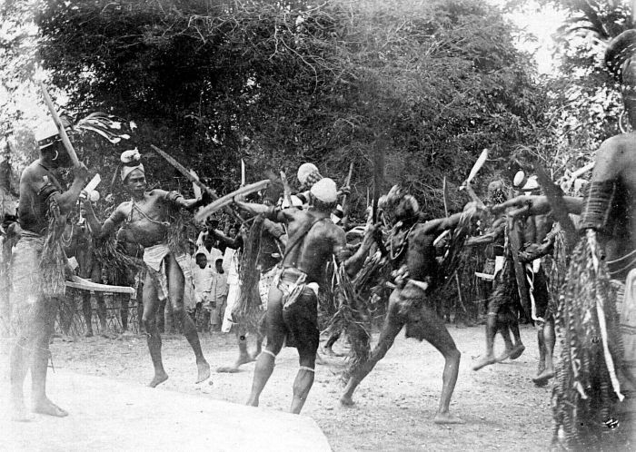 Repronegatief. Honitetoe-Alfoeren voeren de 'Tjakalélé' krijgsdans op te Piru, Seram